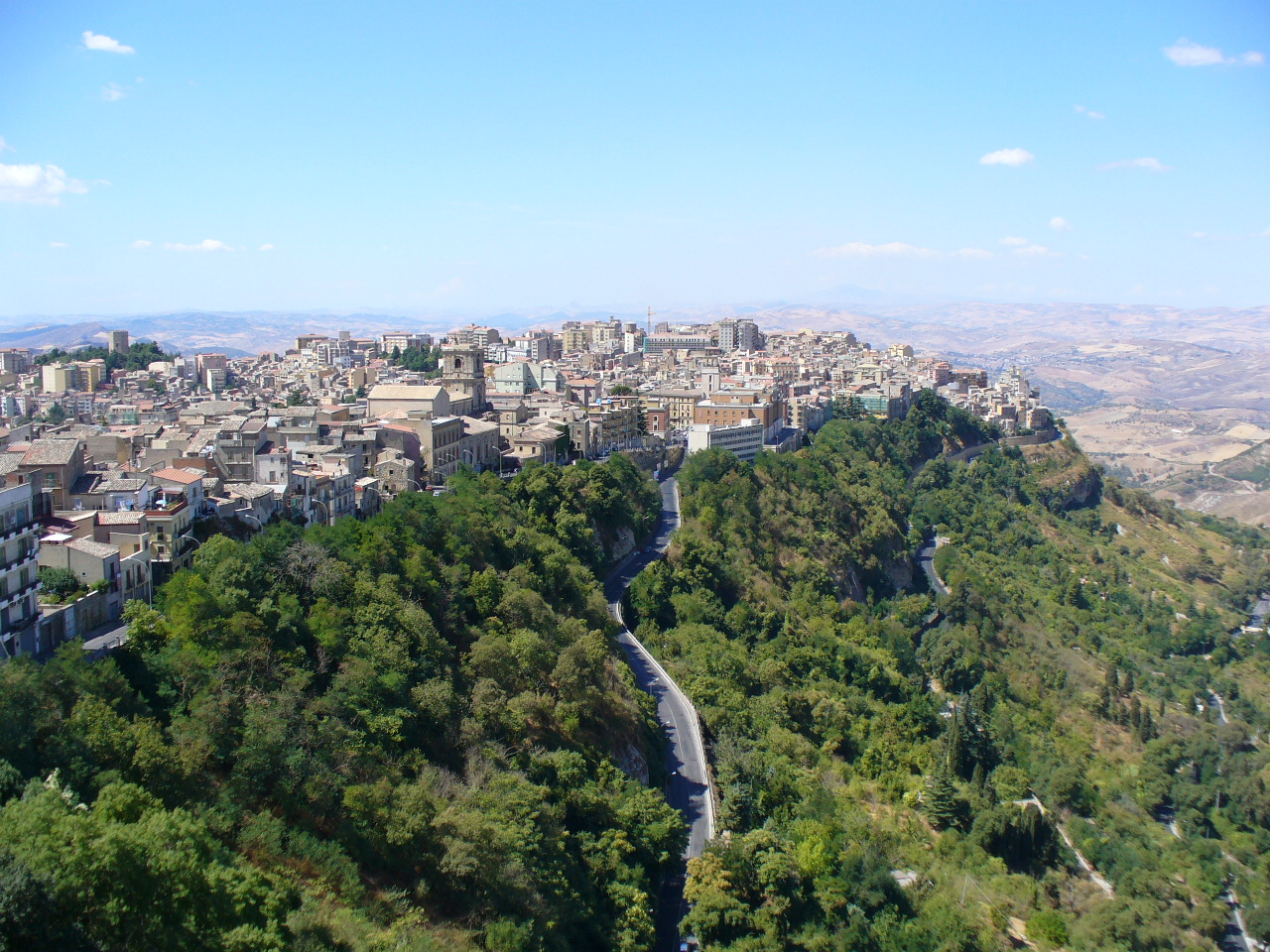 Cidade de Enna, 970m de altitude.